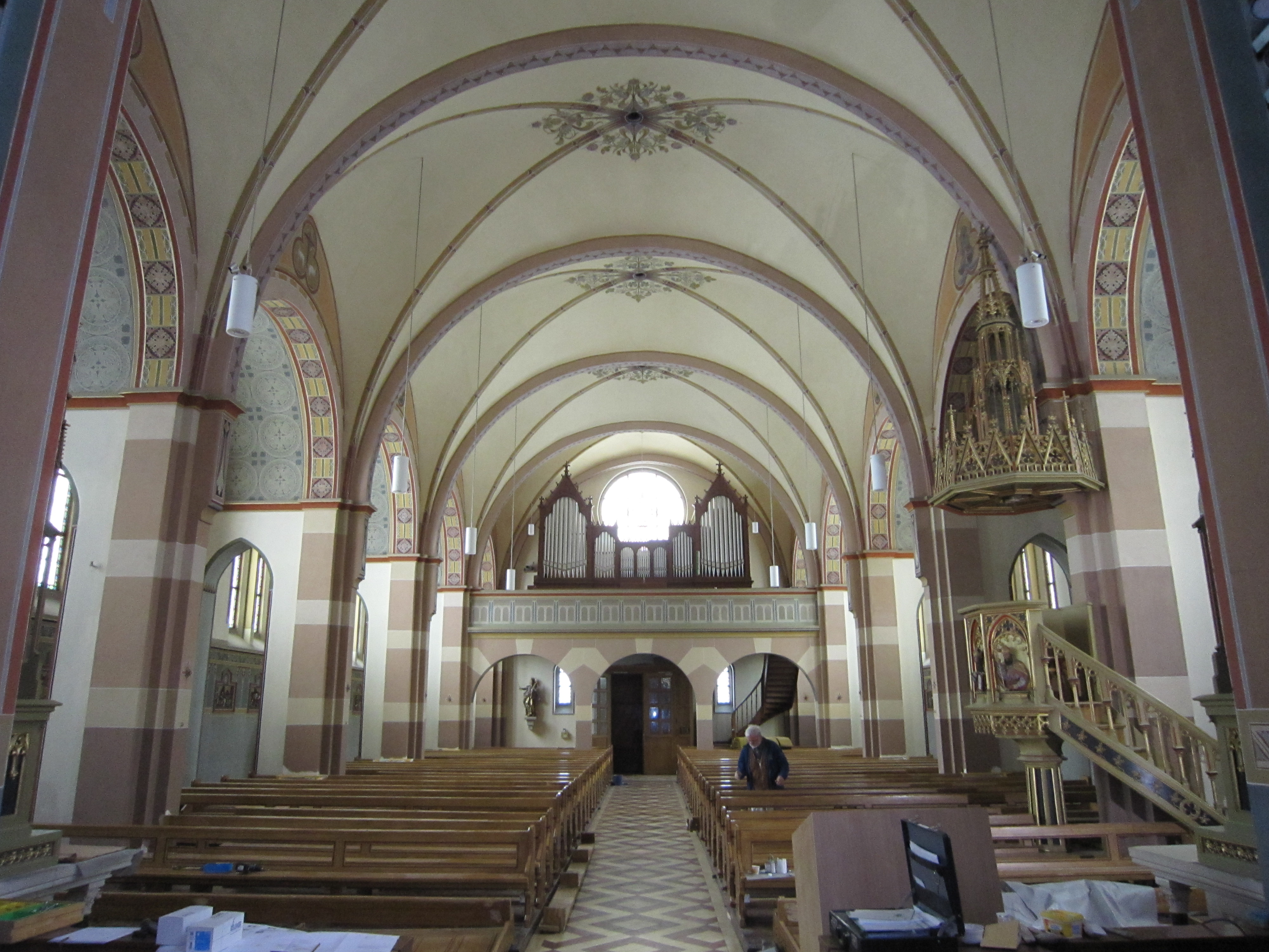 St. Ursula in Dieterskirch, Blick zur Empore, während der letzten Restaurierung, 2018